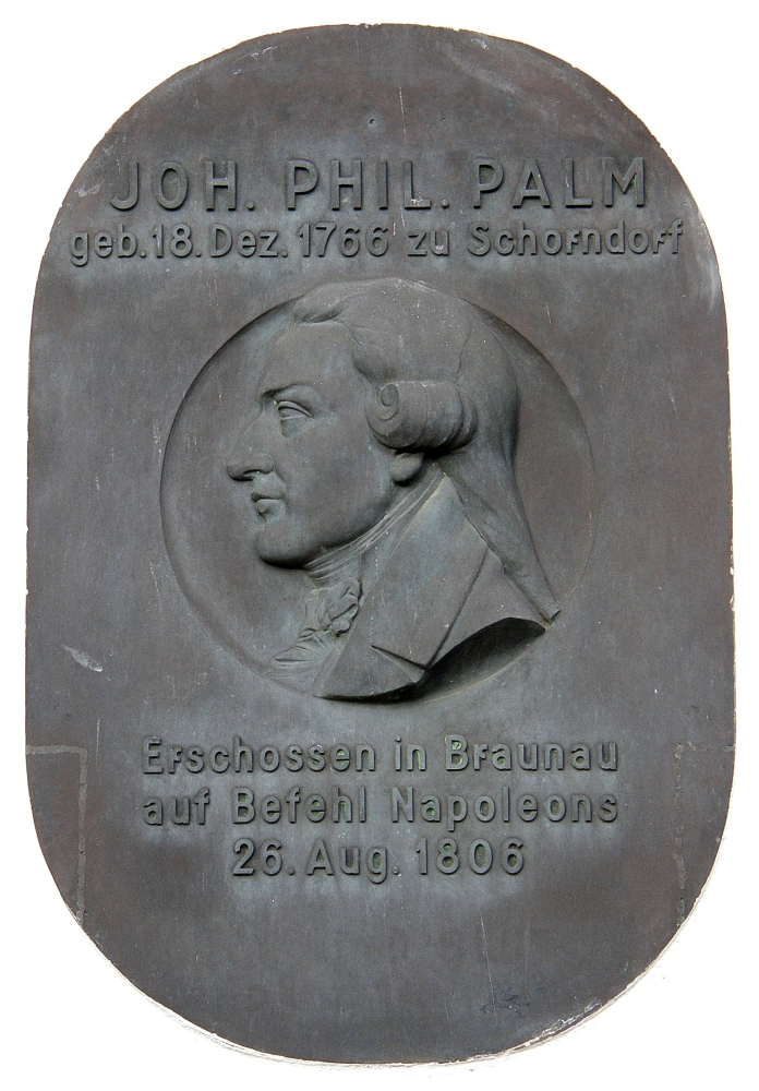 Gedenkstein für Johann P. Palm in Schorndorf